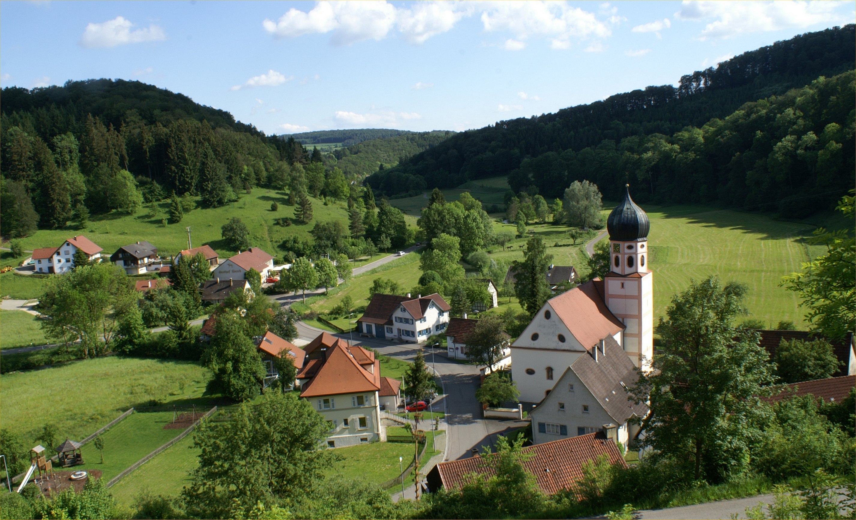 Der Münsinger Stadtteil Bichishausen im Großen Lautertal auf der Schwäbischen Alb